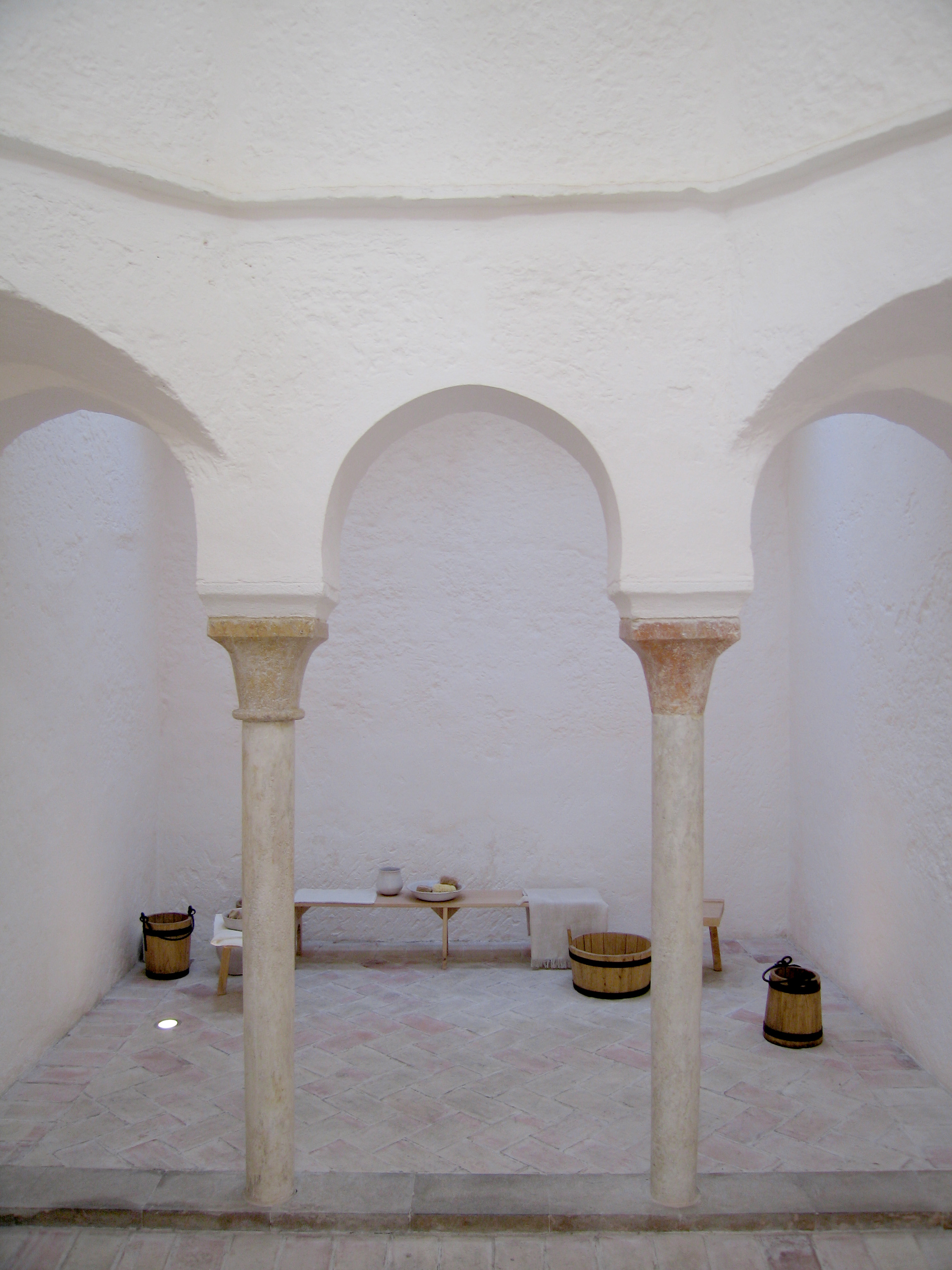 Banys de l'Almirall(València)